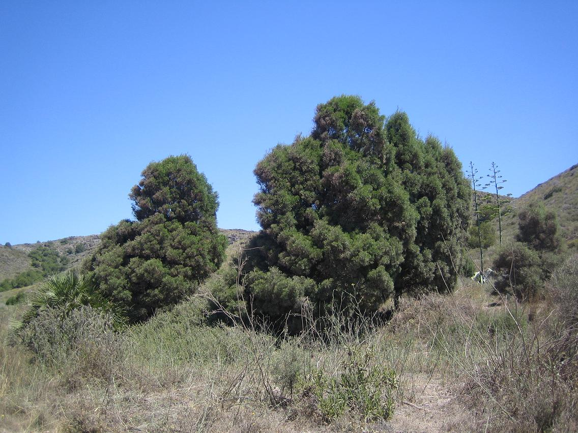 Tetraclinis articulata. Bosquecillo de repoblación de sabina mora o ciprés de Cartagena en el Parque Natural de Calblanque (Cartagena, España).